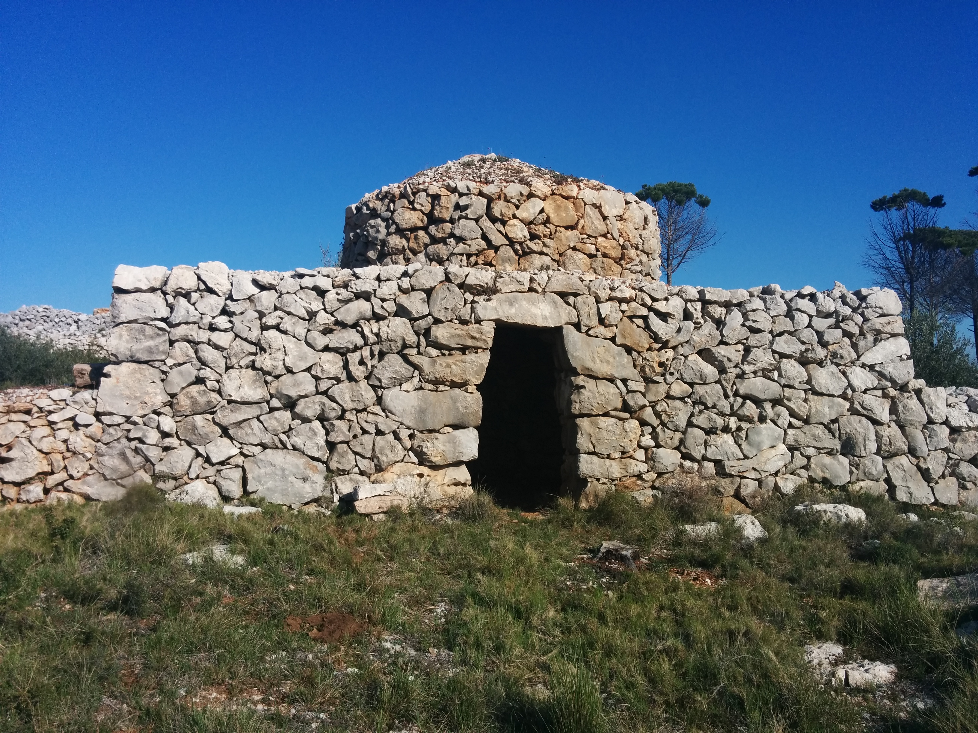 Garriga d'Empordà This is a photography of a Special Area of Conservation in Spain with the ID: ES5120025. Natura2000 entry, EEA entry